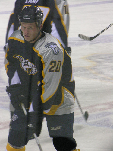 Bild zeigt Ryan Suter von den Nashville Predators